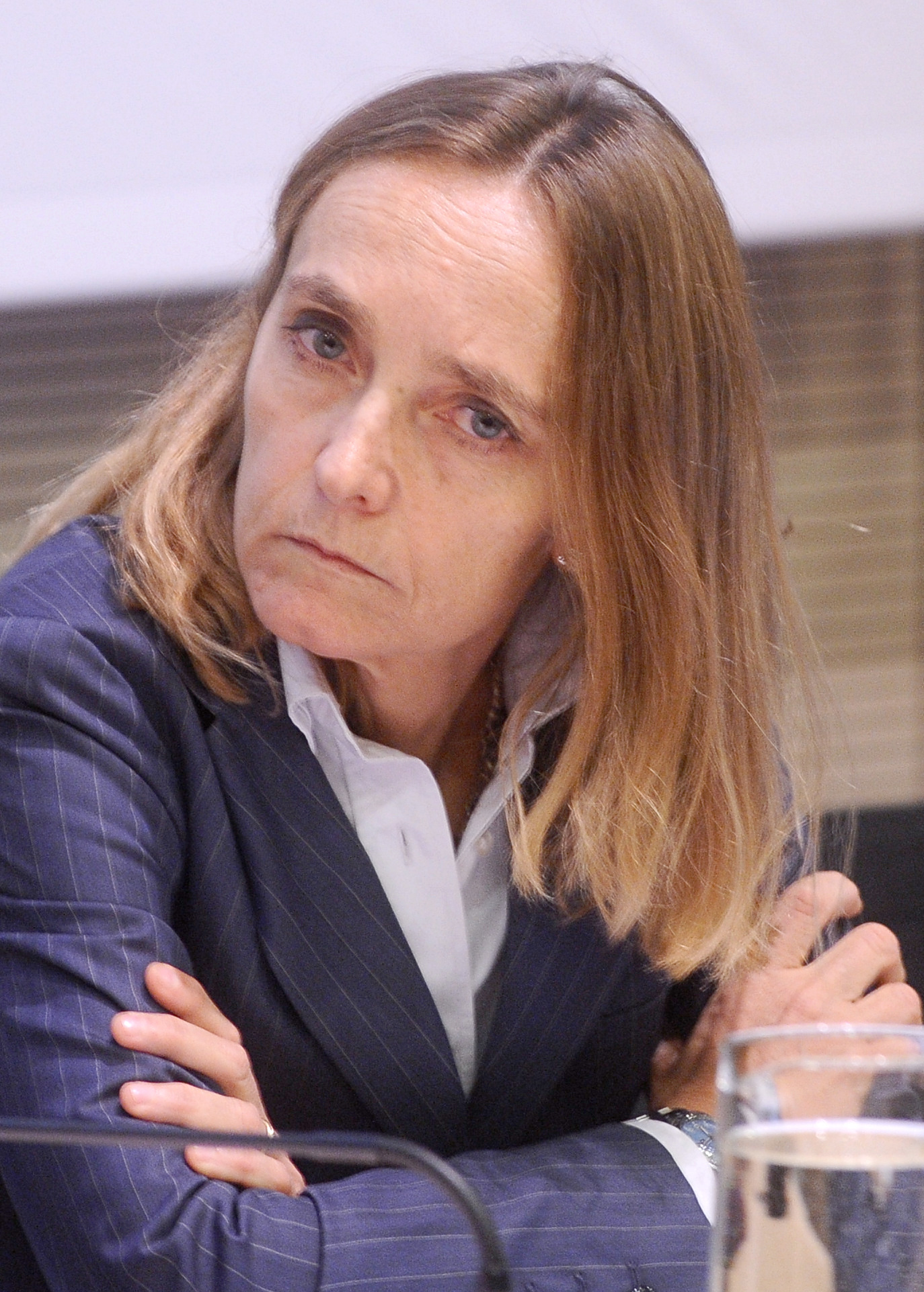 Laura Palazzani a Trento durante un incontro del Comitato Nazionale per la Bioetica con la cittadinanza.